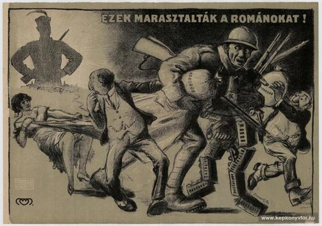 Miltiades Manno Plakat 1919 Ezek marasztaltak a romanokat